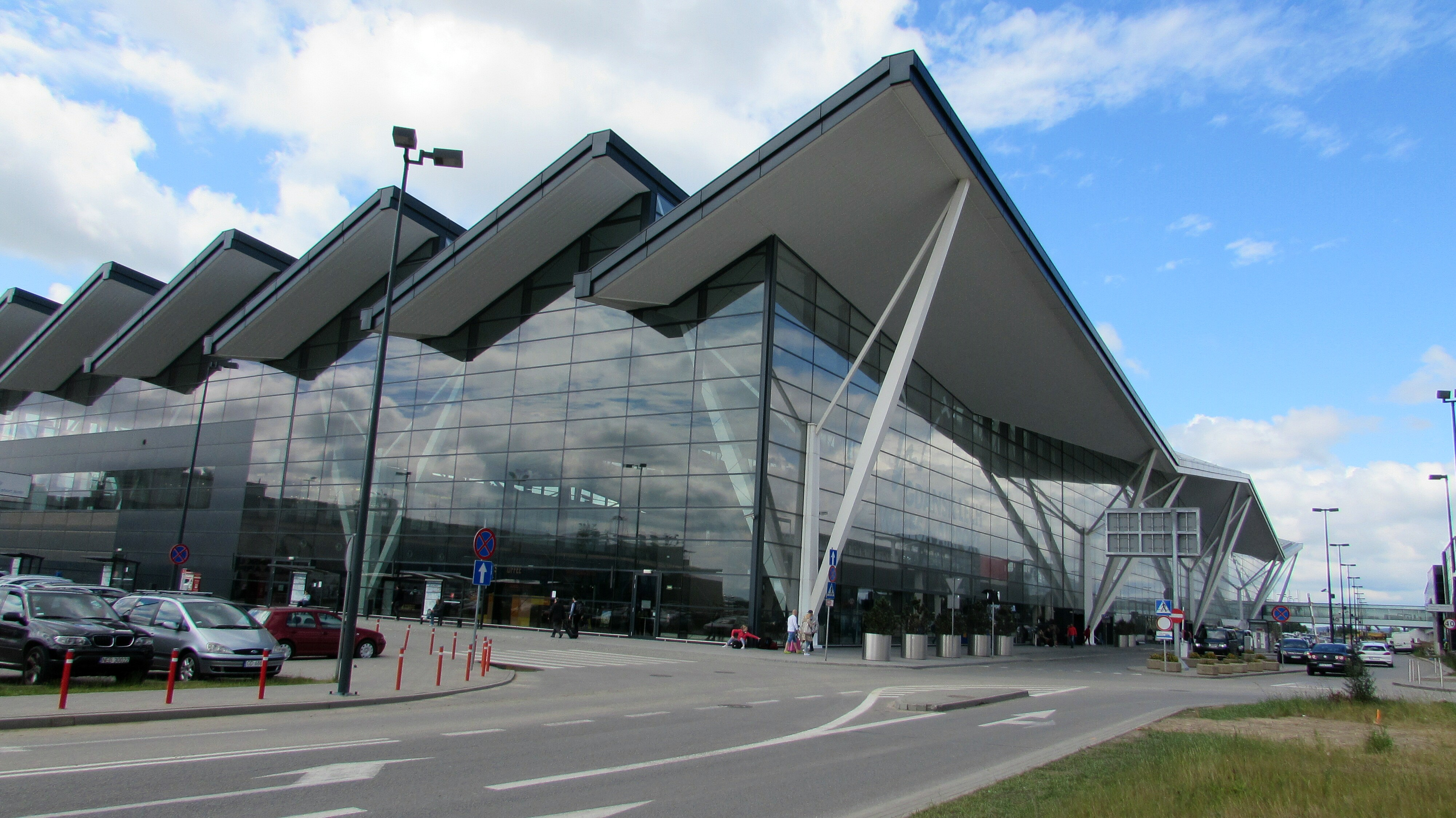 Danzig Lech Walesa Flughafen.